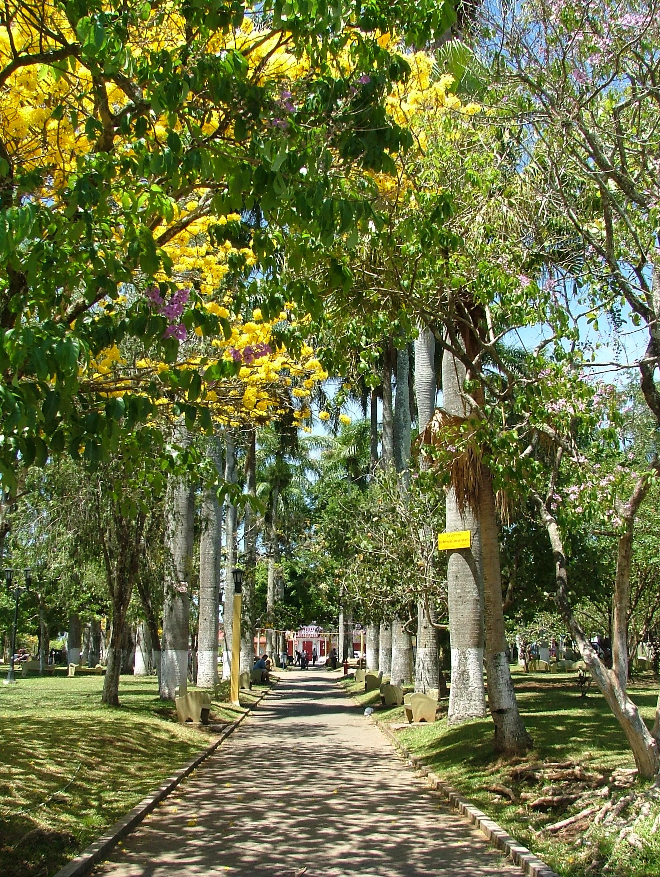 Vista del parque de Atenas, provincia de Alajuela, Costa Rica.